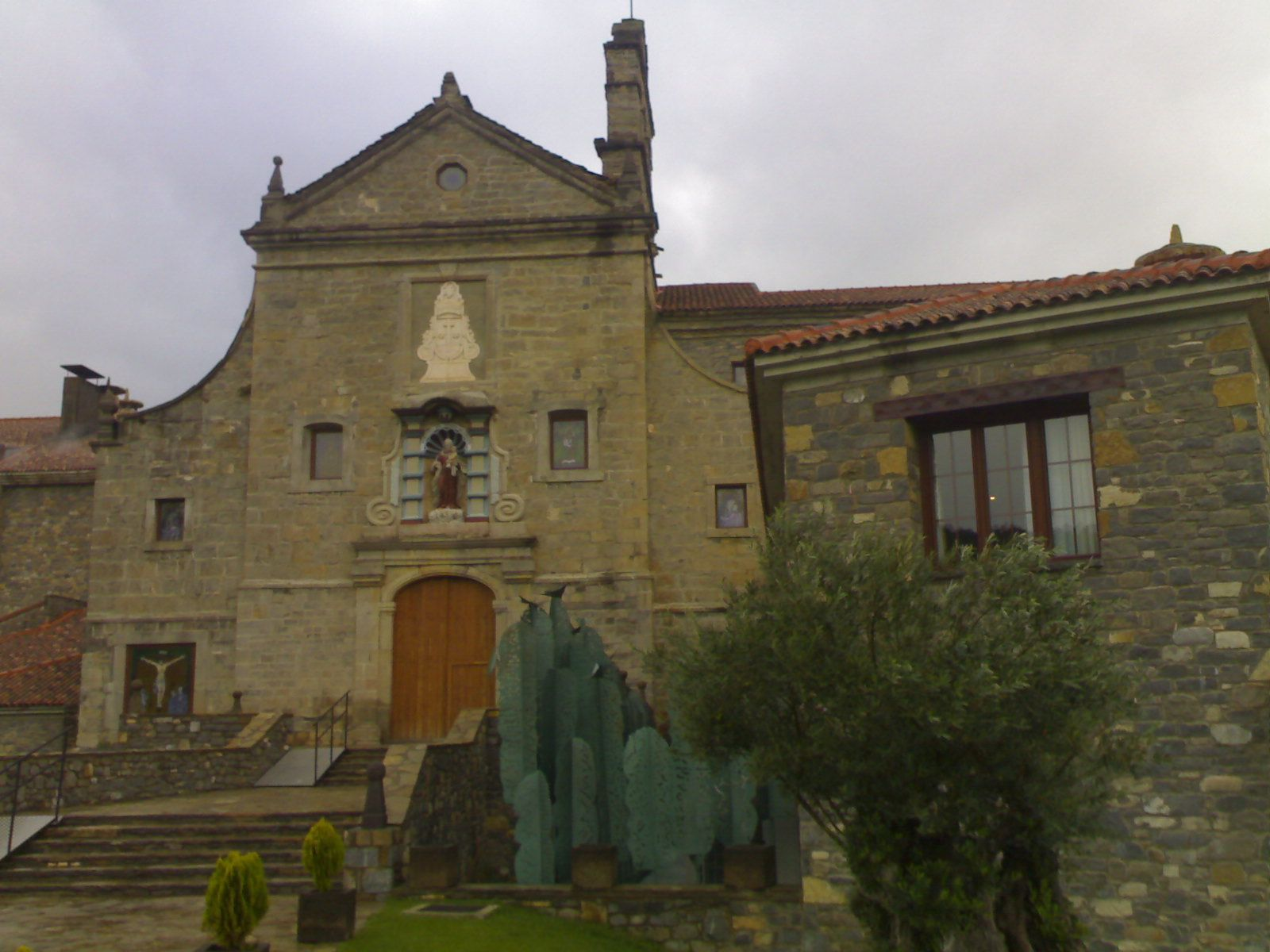 Hotel "Monasterio" de Boltaña (Boltaña, Sobrarbe, Aragón)